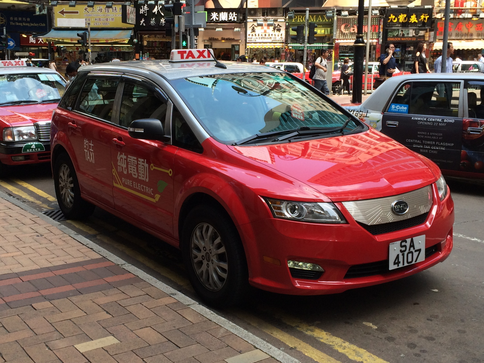 BYD Taxi in Hong Kong